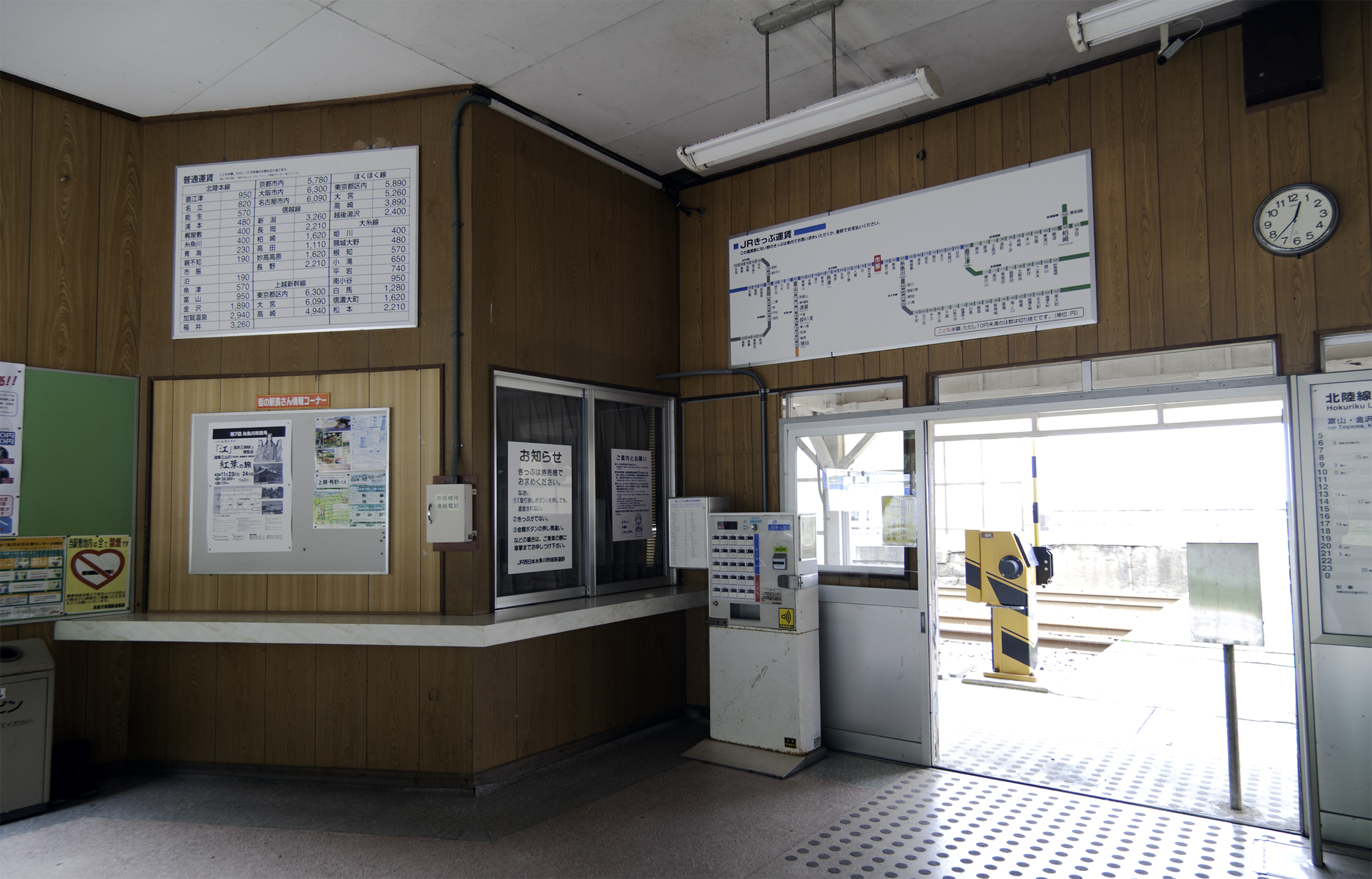 西日本旅客鉄道株式会社市振駅駅舎内